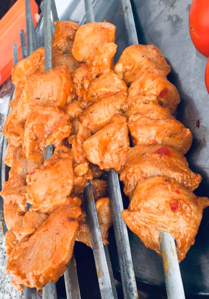 صورة لكباب تيكا قبل الشواء،حيث توضح الصورة لون البهارات(الخلطة الأردنية) المستخدمة